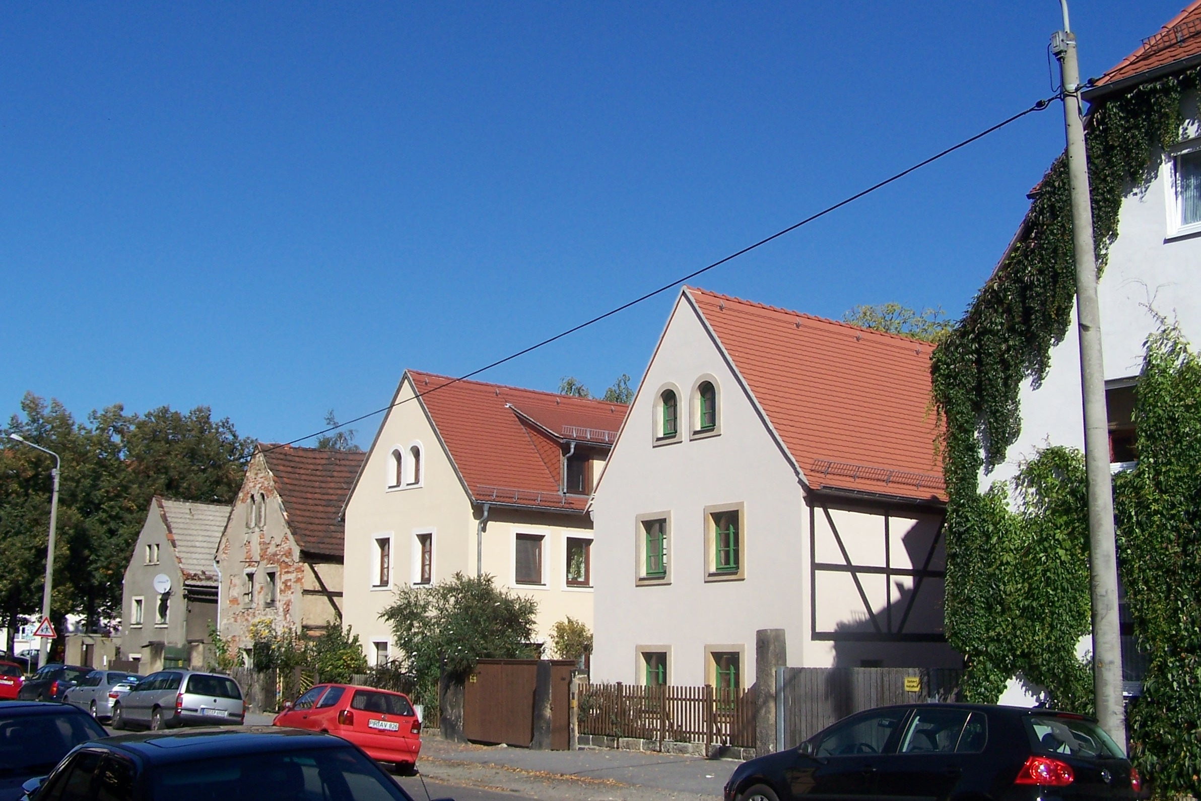 Rest von Altpieschen in Dresden